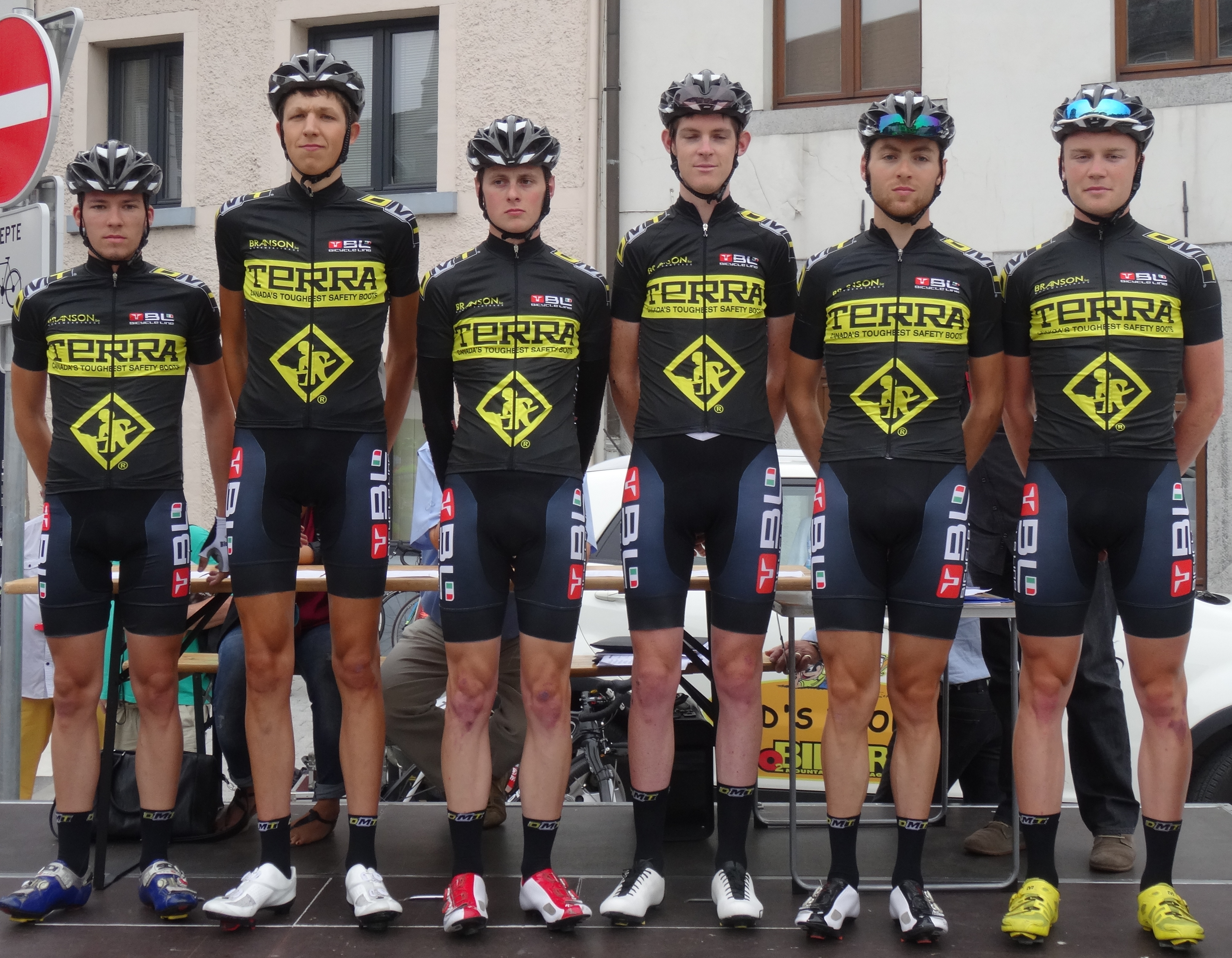 Reportage photographique réalisé le mercredi 6 août à l'occasion du départ de la première étape du Tour de la province de Namur 2014 à Jambes (Namur), Belgique.